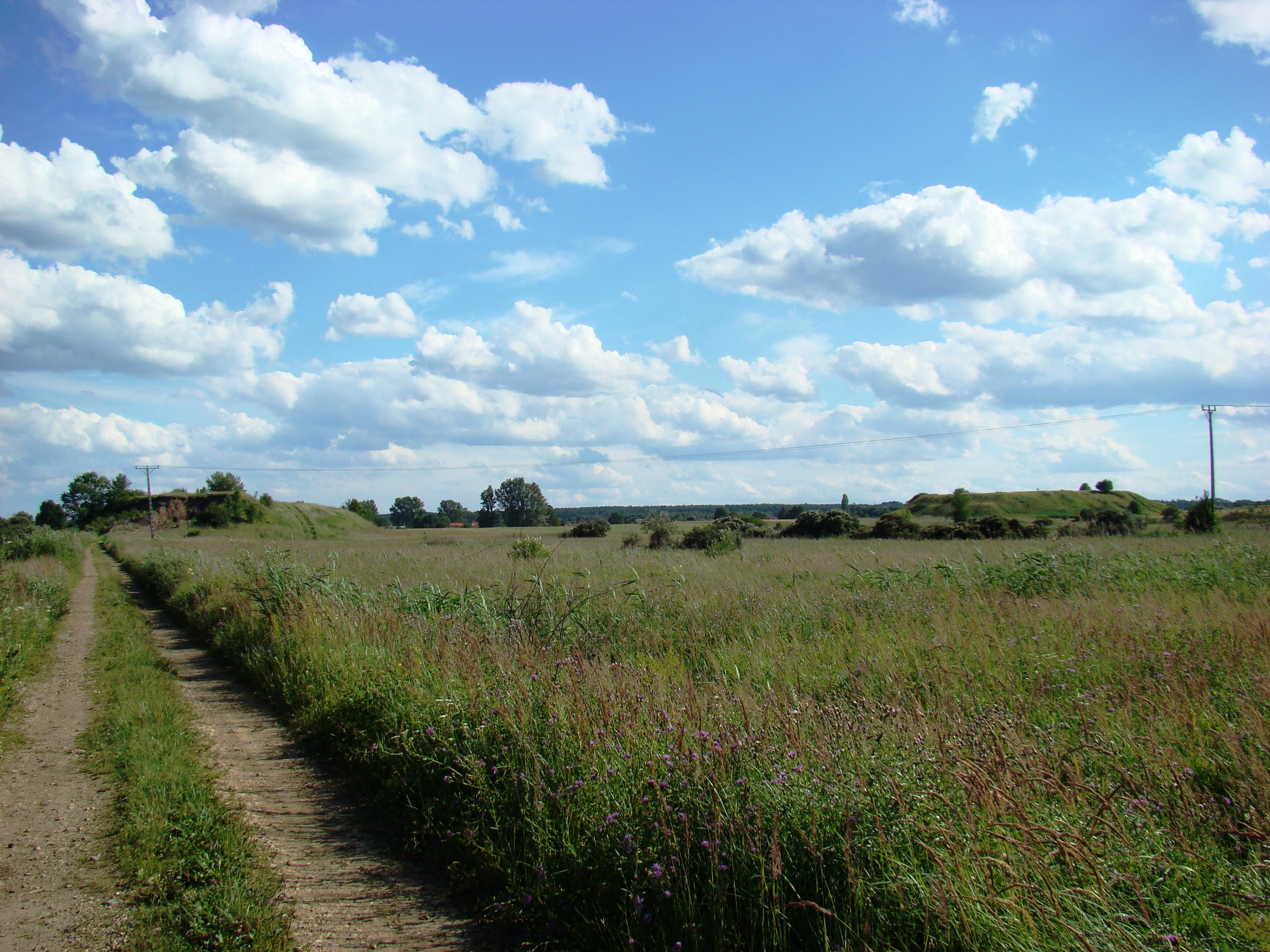 Dwie hałdy pokopalniane rud żelaza w okolicach Jastrzębia, gmina Poraj.